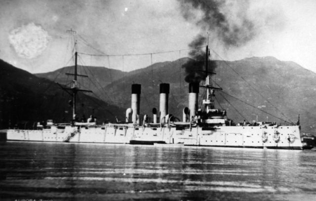 Крейсер Аврора на Средиземном море, 1903